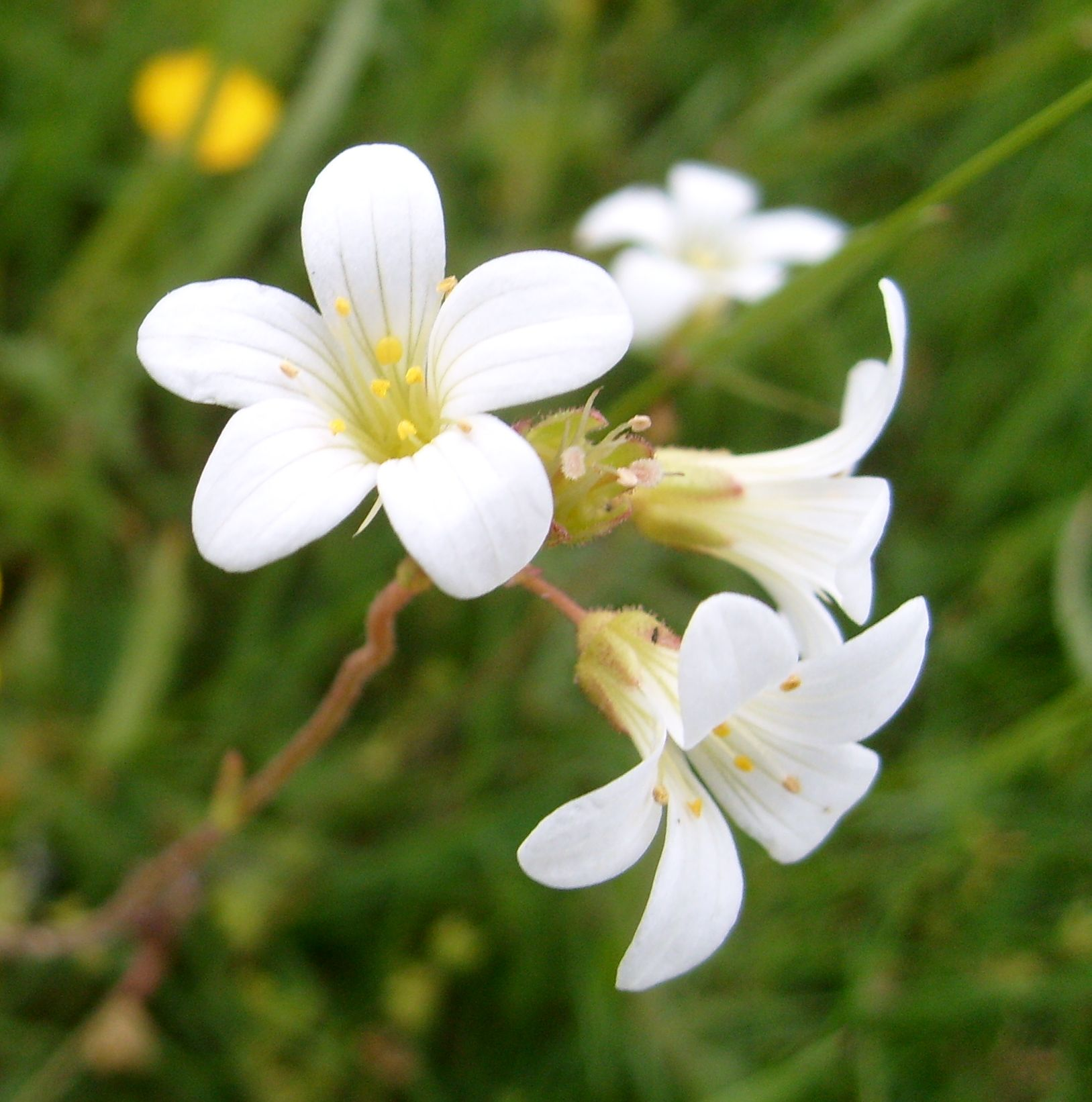 Knéirenn am Ourdall - 20. Mee 2008.